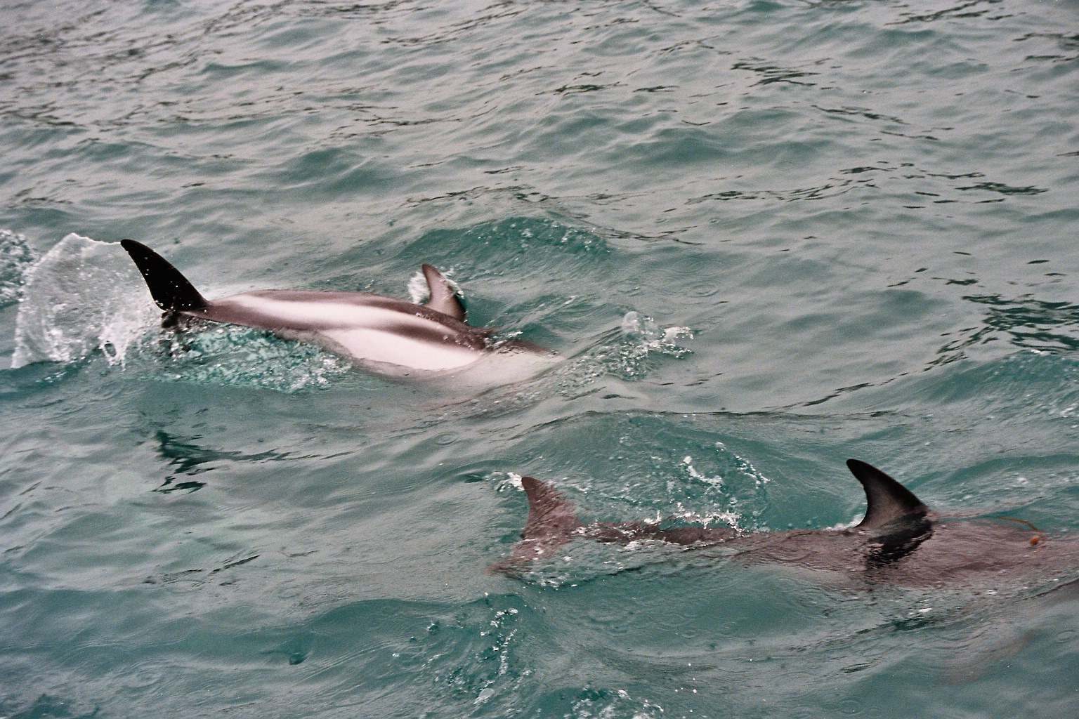 Delfines oscuros